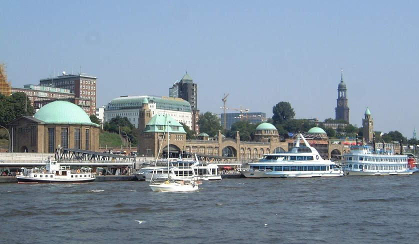 St.Pauli Landungsbrücken 14.8.2000